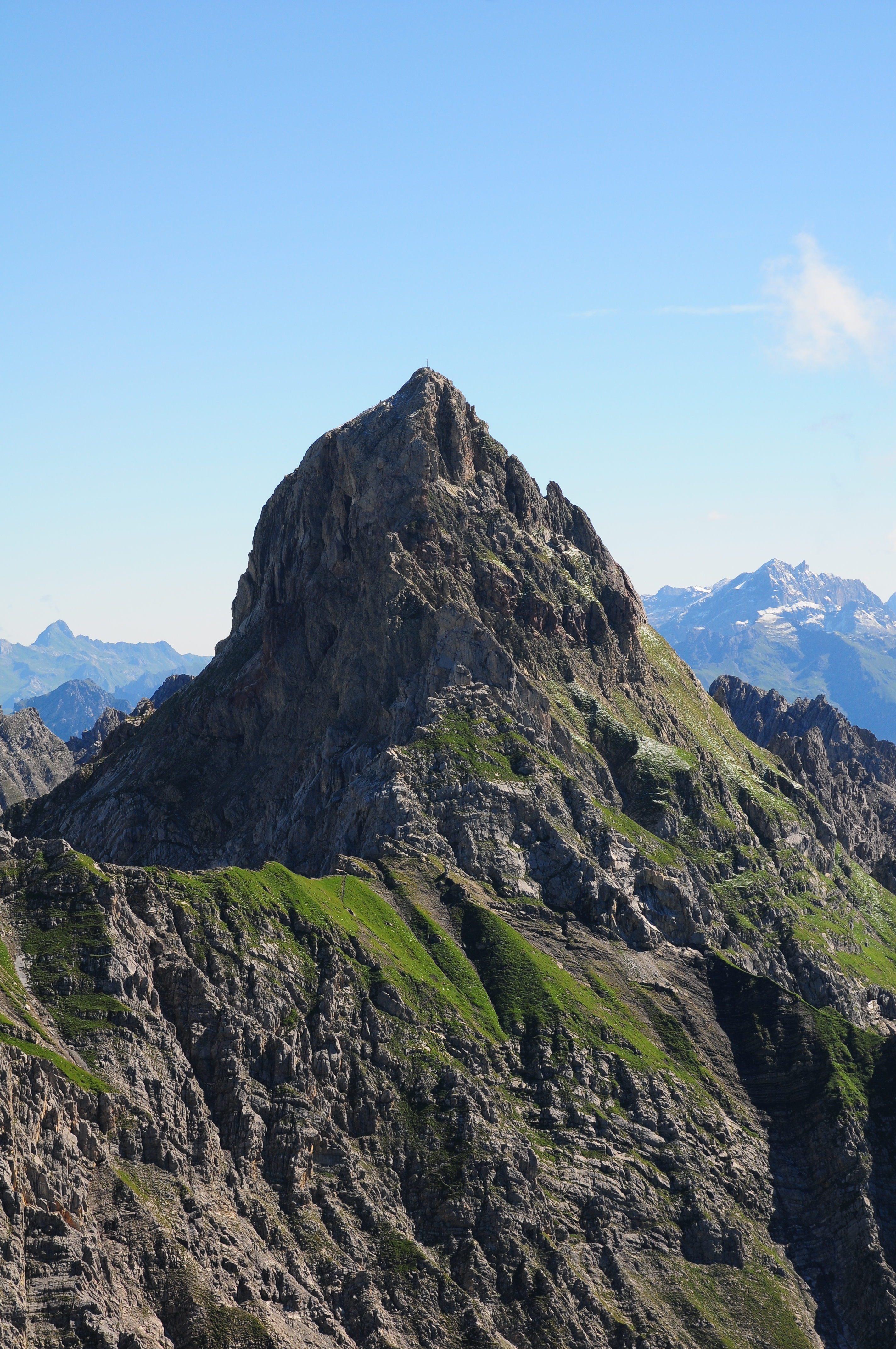 Die Zimba ist mit einer Höhe von 2643m der bekannteste Berg des Montafons, (Vorarlberg/Österreich). Gesehen vom Saulakopf 2.517 m.